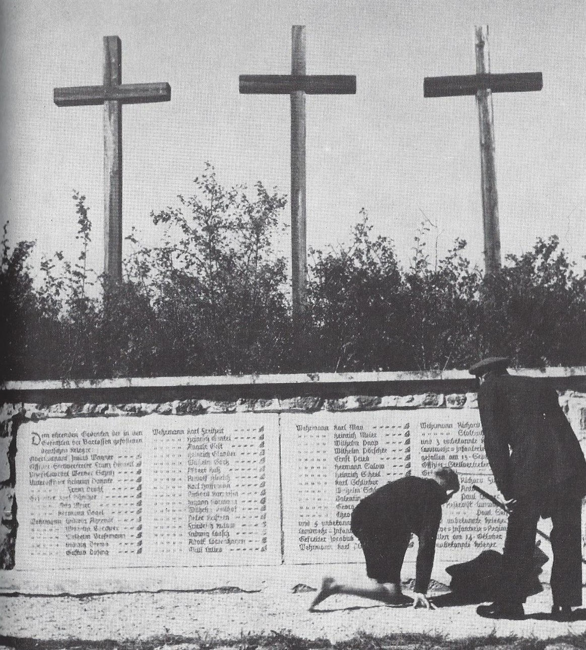 Gedenkstätte für 84 gefallene deutsche Soldaten in Bartossen